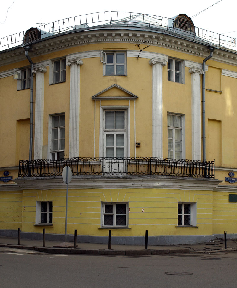 Denezhny lane, Moscow.